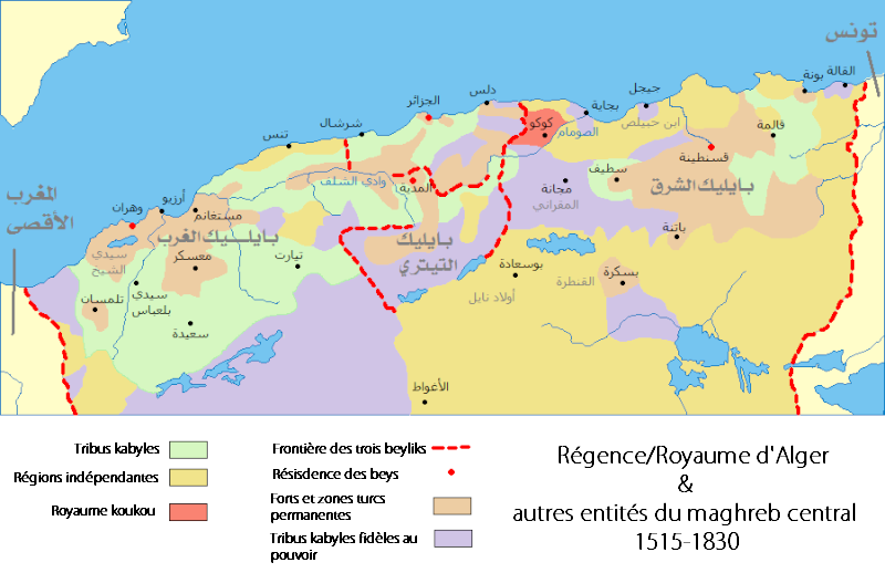 Voir titre.